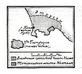 Битва при Кумах (474 год до нашей эры). Это изображение было использовано для иллюстрирования статьи «Киме» (ныне Кумы) опубликованной в двенадцатом томе «Военной энциклопедии», который был издан книгоиздательским товариществом И. Д. Сытина в 1913 году в столице Российской империи городе Санкт-Петербурге. Более подробное описание к этой картинке можно прочесть в указанной выше статье.